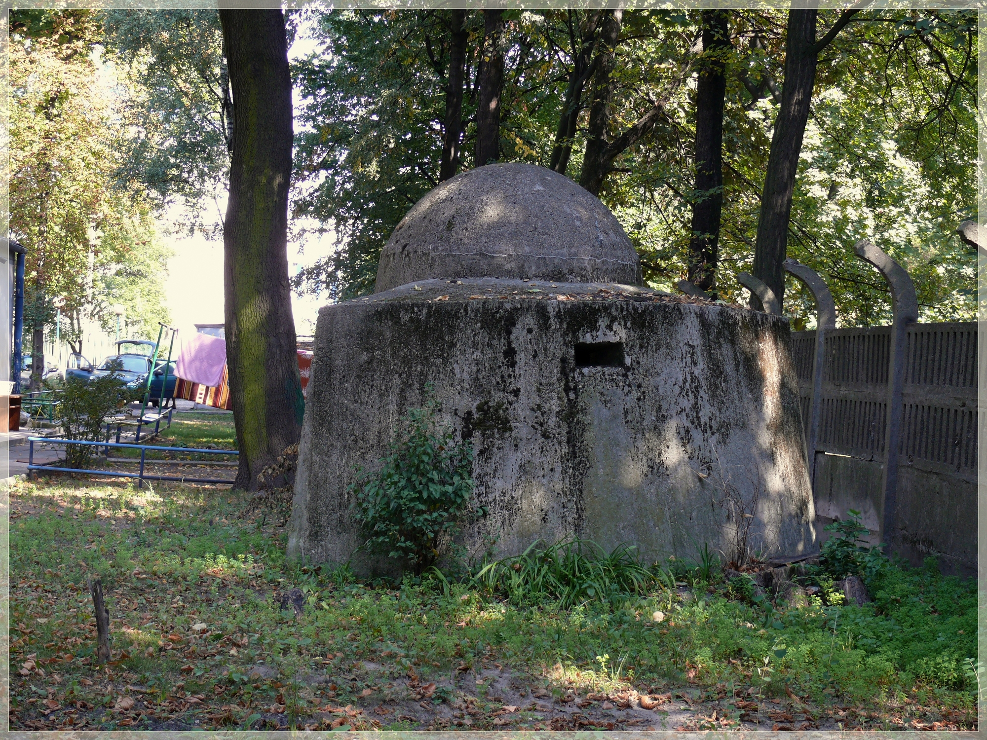 Schron z czasów II Wojny Światowej, usytuowany na terenie lubelskiej cukrowni, na podwórzu domu ze służbowymi mieszkaniami. Wpisany do rejestru zabytków (wraz z pozostałymi budowlami zespołu Cukrowni) pod nr A/1101/1-15 z 05.06.1995